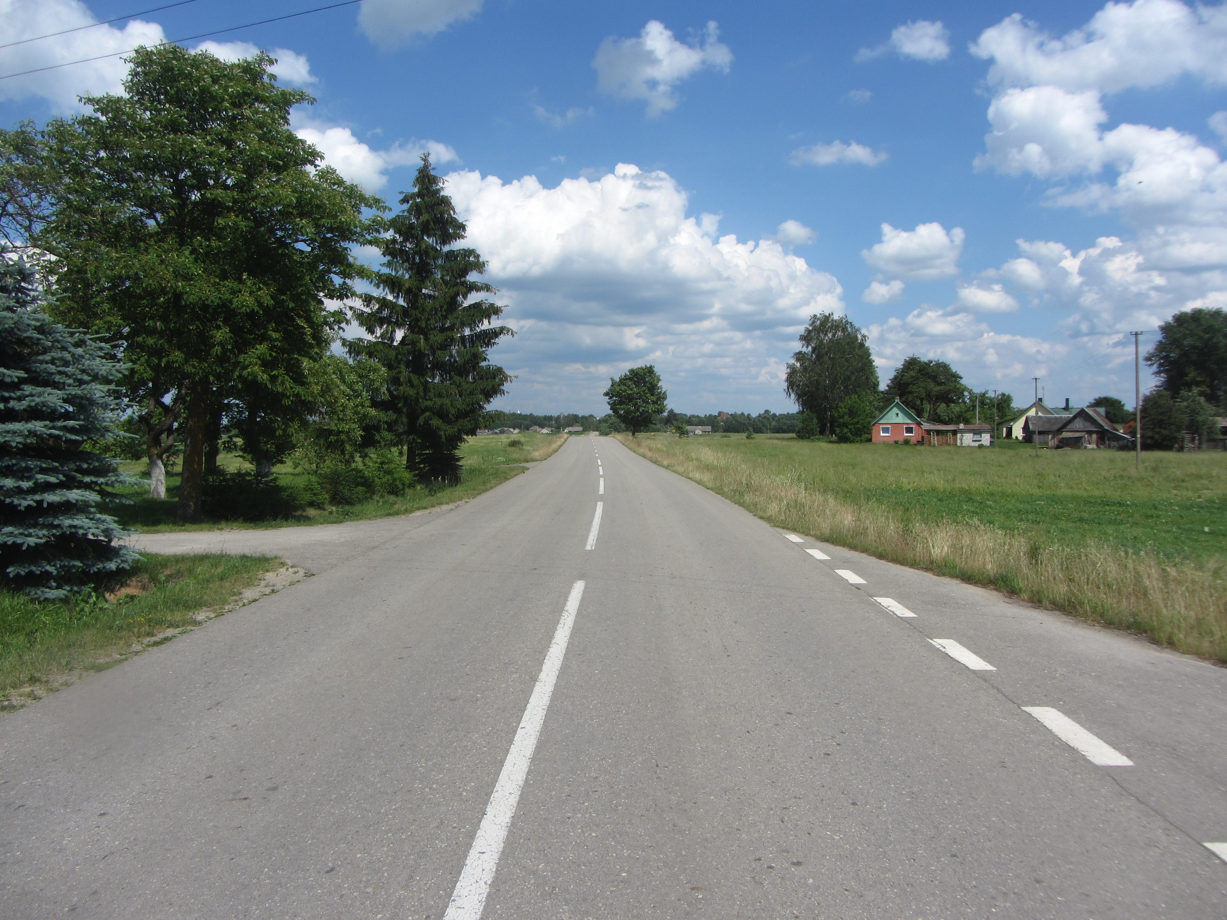 Butrimonių sen., Lithuania